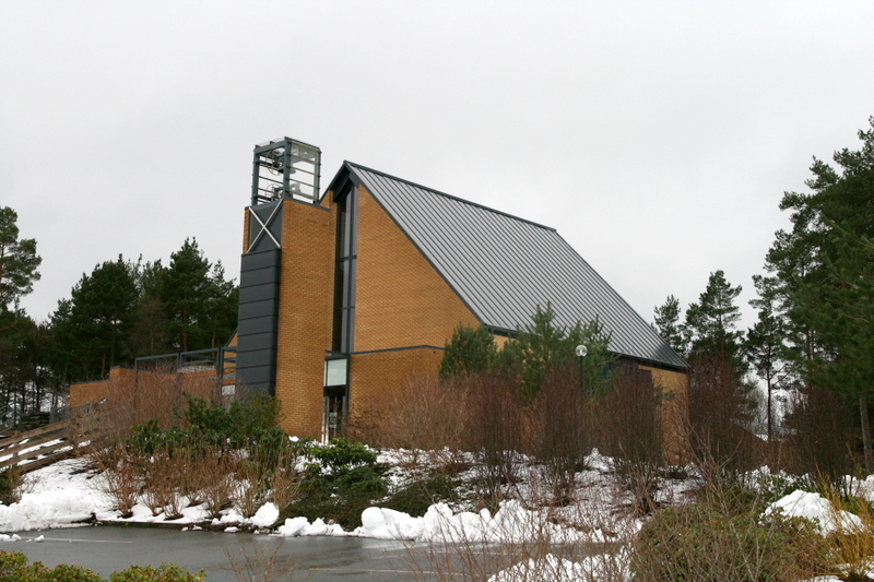 Nore Neset kyrkje